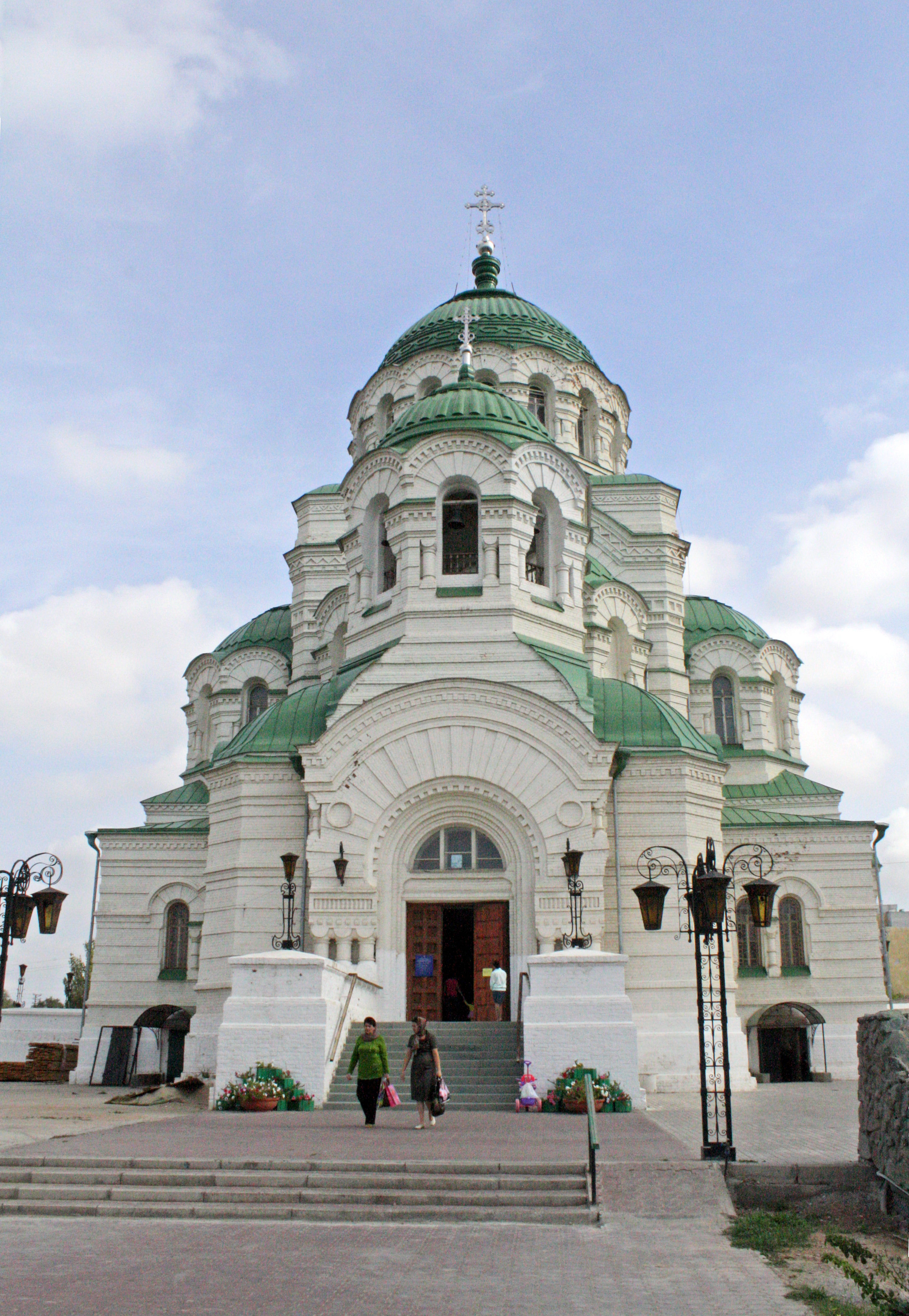 St. Vladimir cathedral. Astrakhan. Russia. Собор святого равноапостольного князя Владимира. Астрахань. Россия